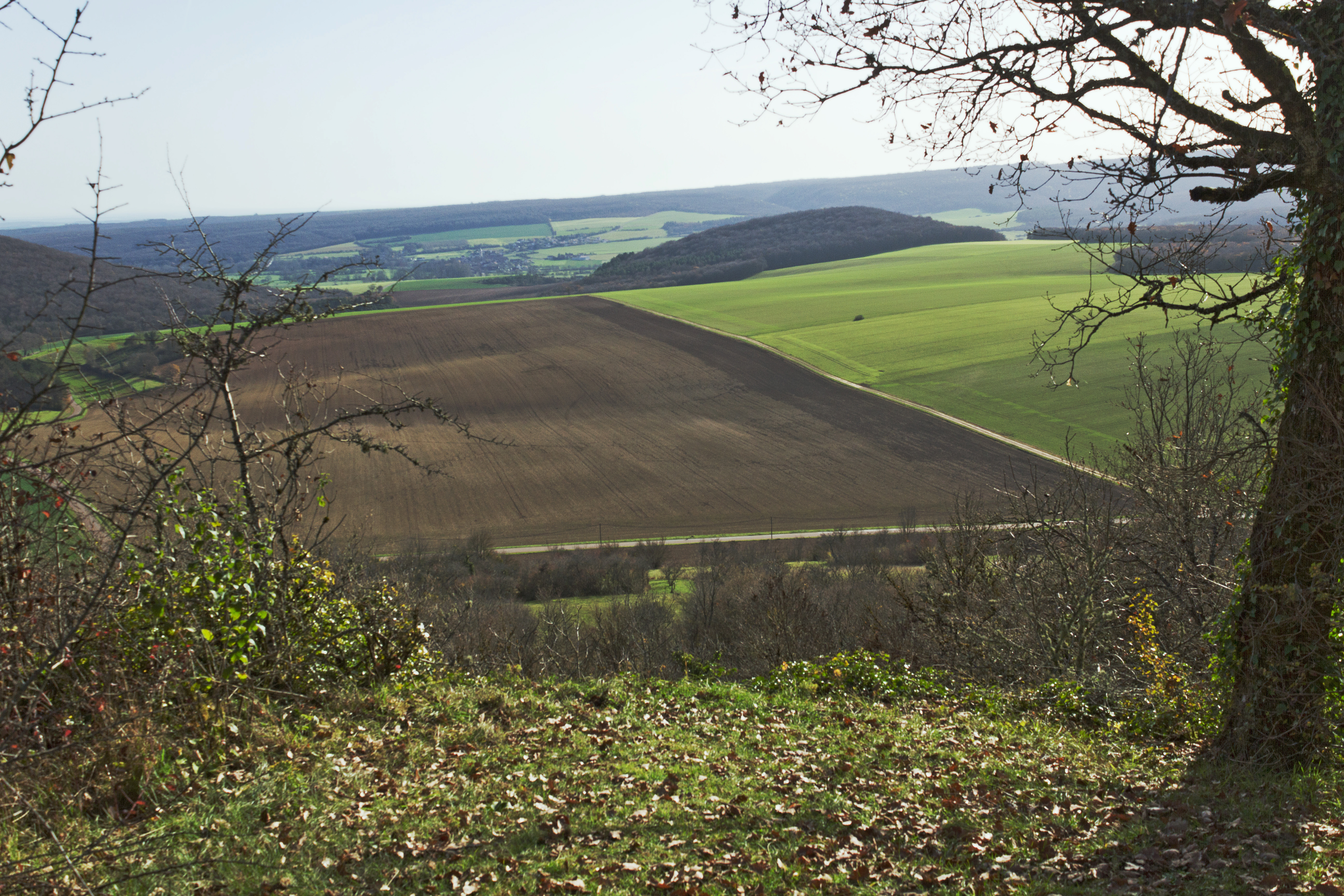 Combe Méline, butte de Touloison (424 m) et au loin le village de Villecomte vus depuis la butte Saint-Siméon de Saulx-le-Duc